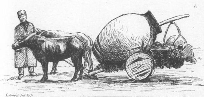 Chariot Souanethie.